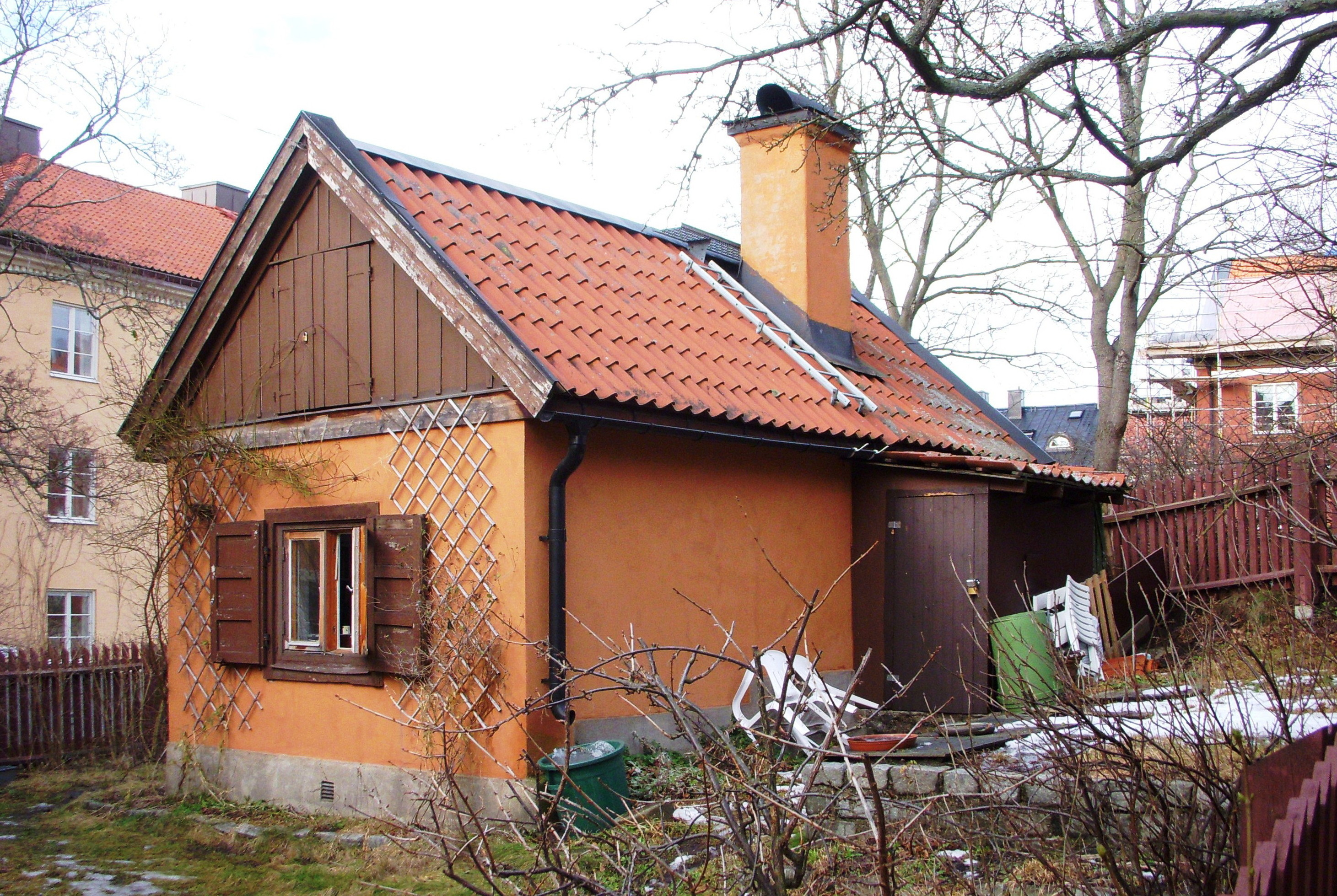 Gamla kvarnstugan i Helgalunden, Södermalm